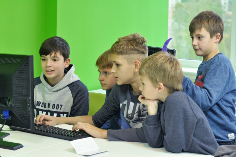 Занятия по программированию в Main School